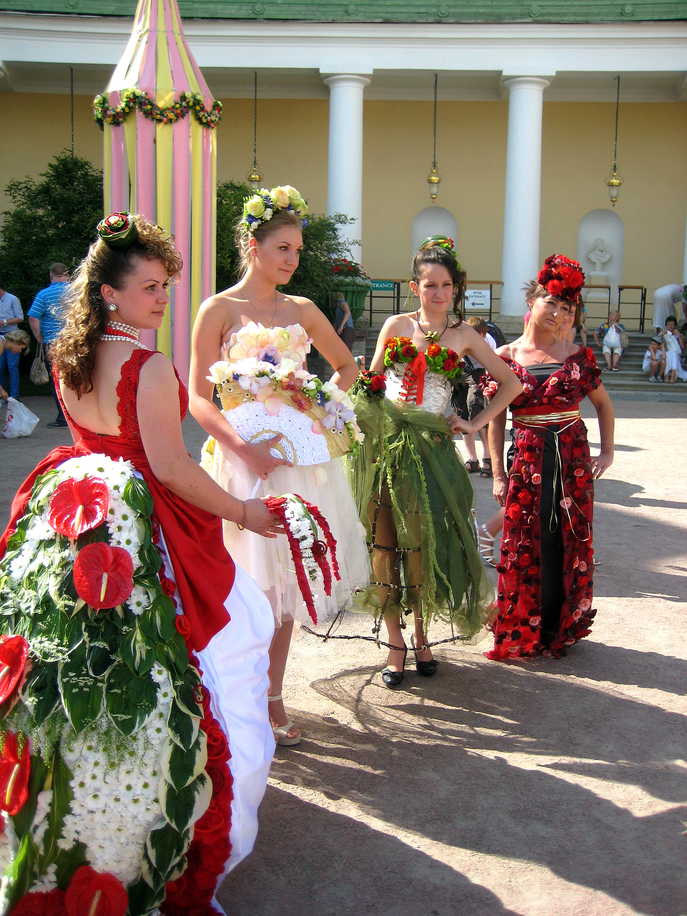 Фестиваль цветов 2013 года в Павловском парке